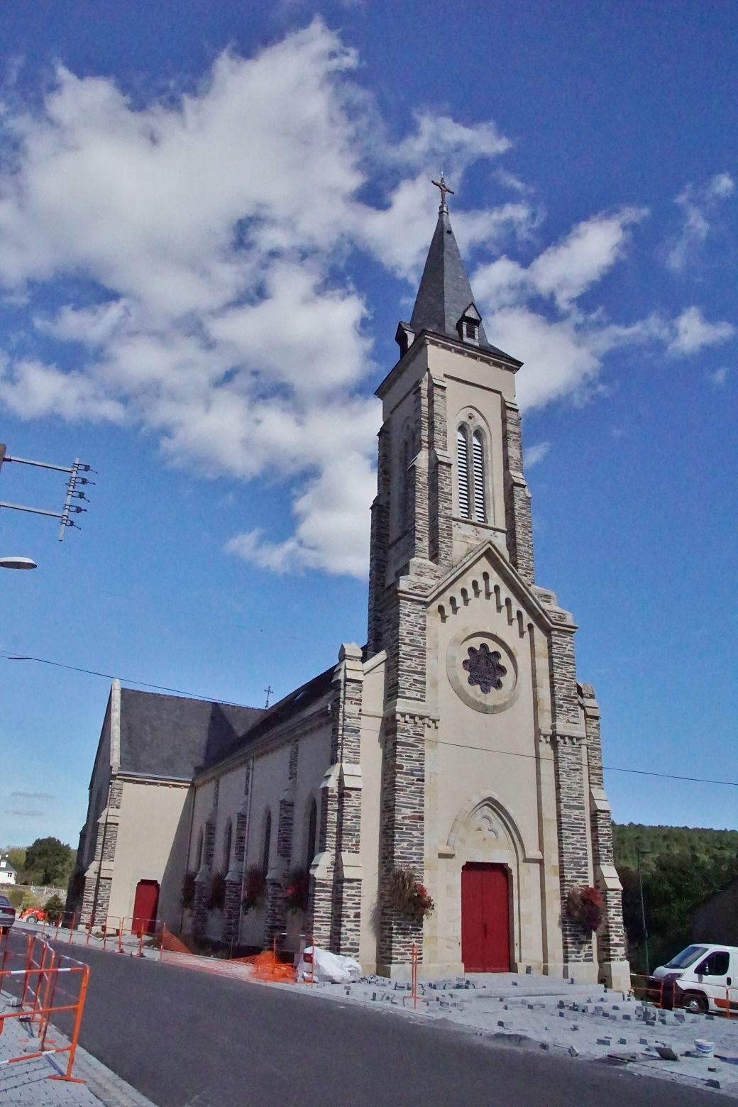 Église Saint Congard de Saint-Congard (56).